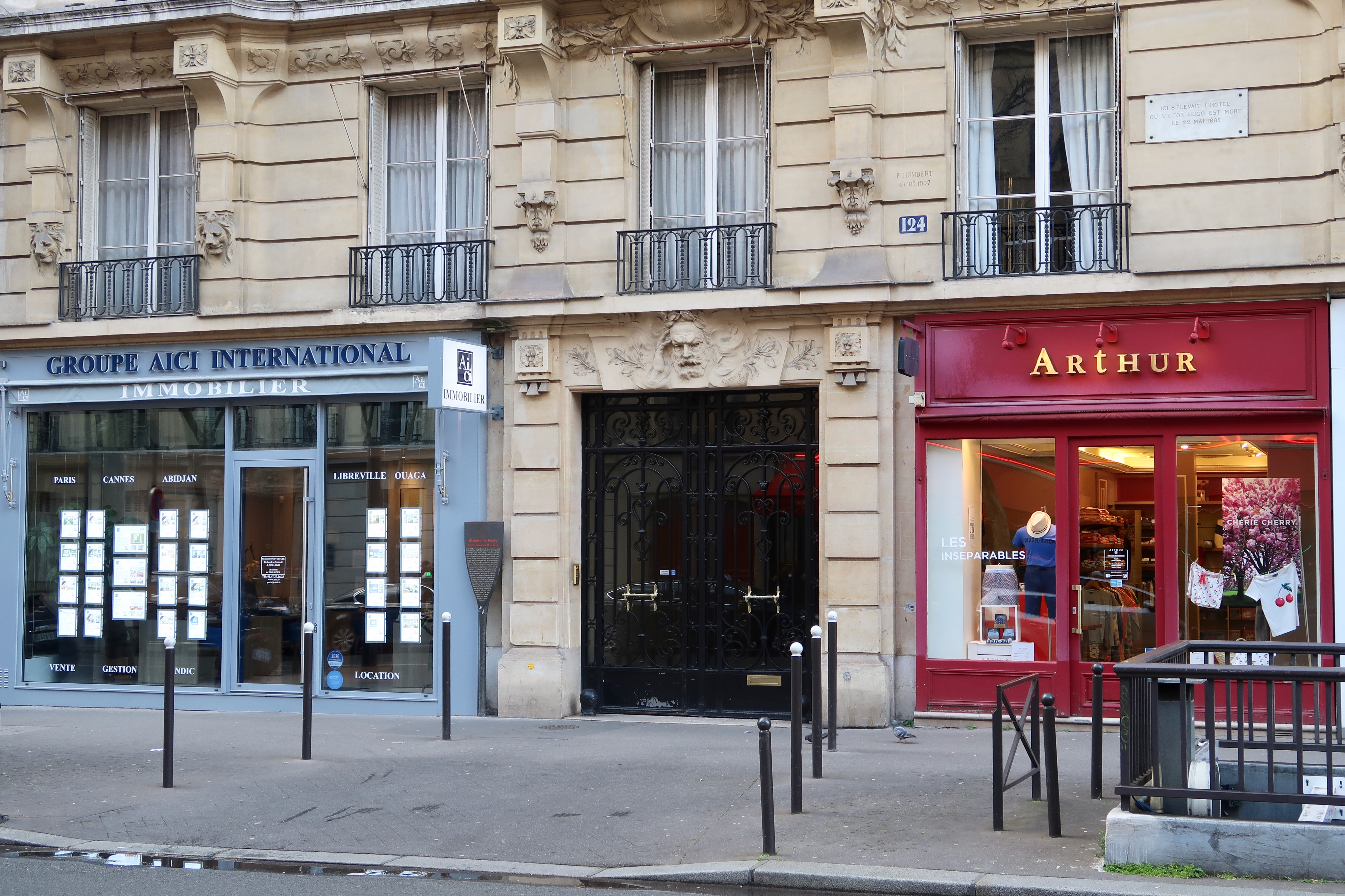 Immeuble n°124 avenue Victor-Hugo (Paris), où s'élevait le petit hôtel particulier de Victor Hugo au XIXe siècle. Présence d'un panneau Histoire de Paris, d'une plaque et d'un bas-relief.